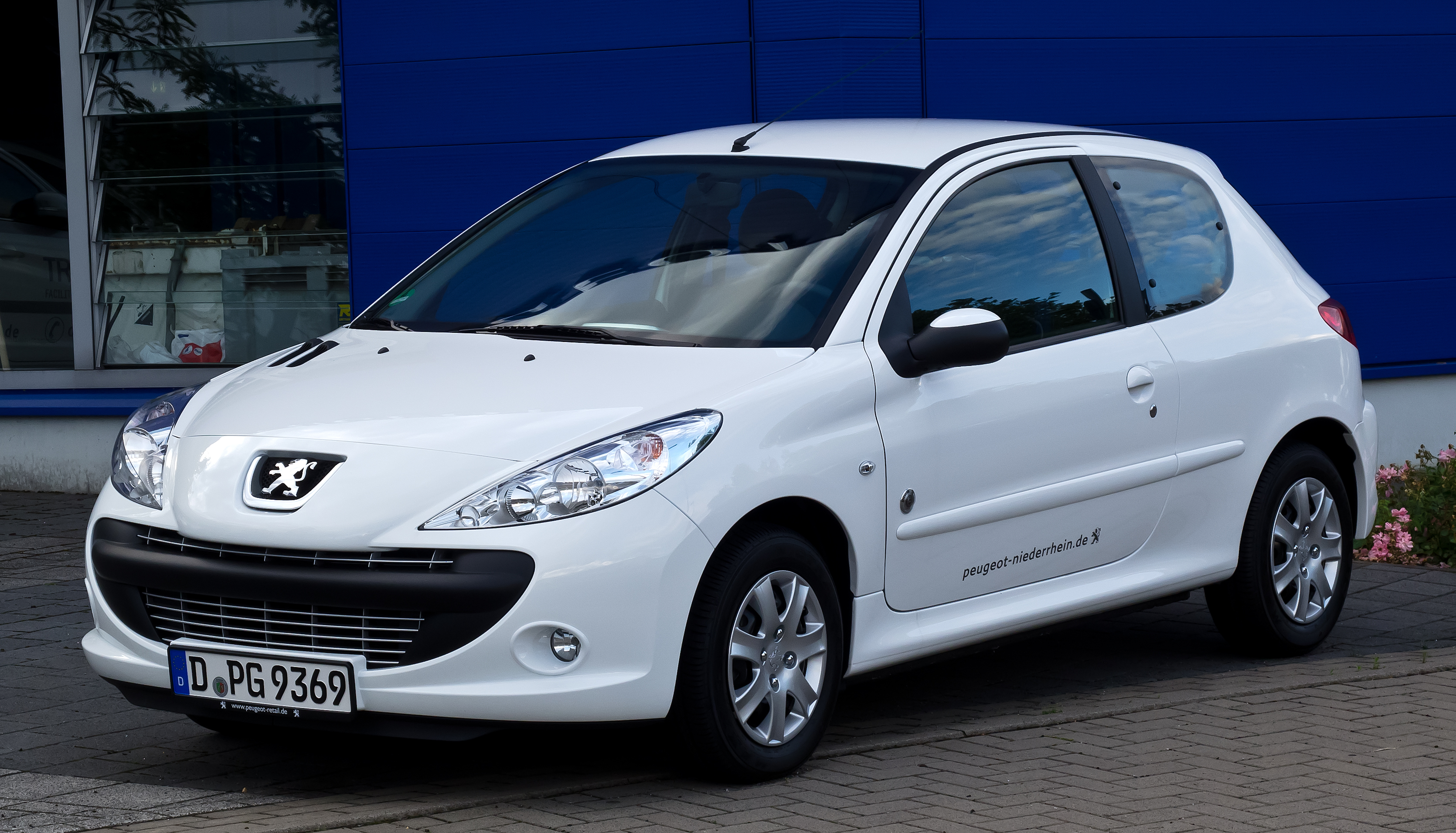 Peugeot 206+ 60 Generation